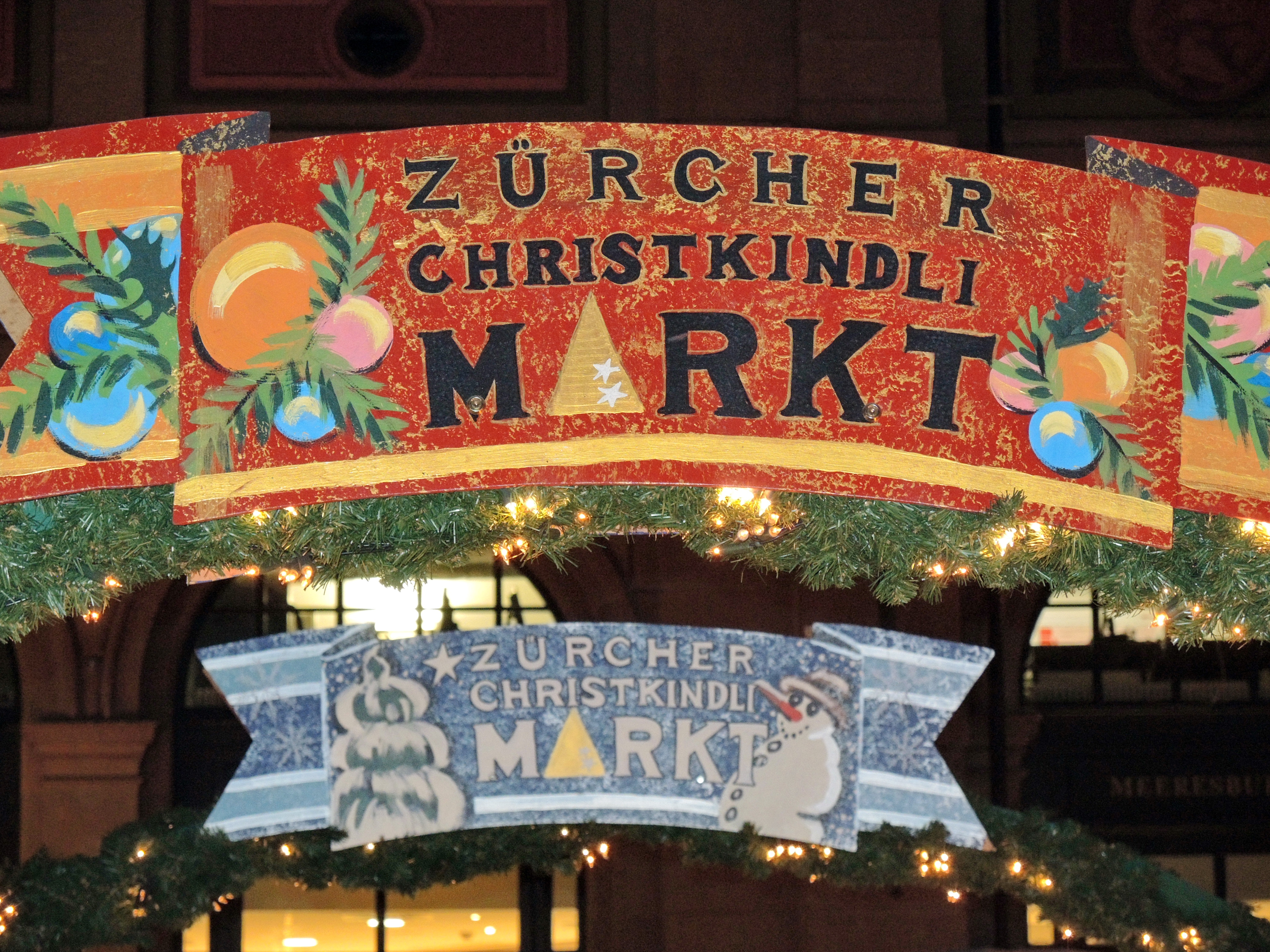 Christkindli-Markt, Hauptbahnhof in Zürich (Switzerland)